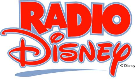 Altes Logo von Radio Disney